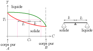 Solidification et diagramme binaire : illustration de la règle des moments. Auteur : Christophe Dang Ngoc Chan (Cdang), réalisé avec un programme de dessin vectoriel. Licence GFDL Christophe Dang Ngoc Chan